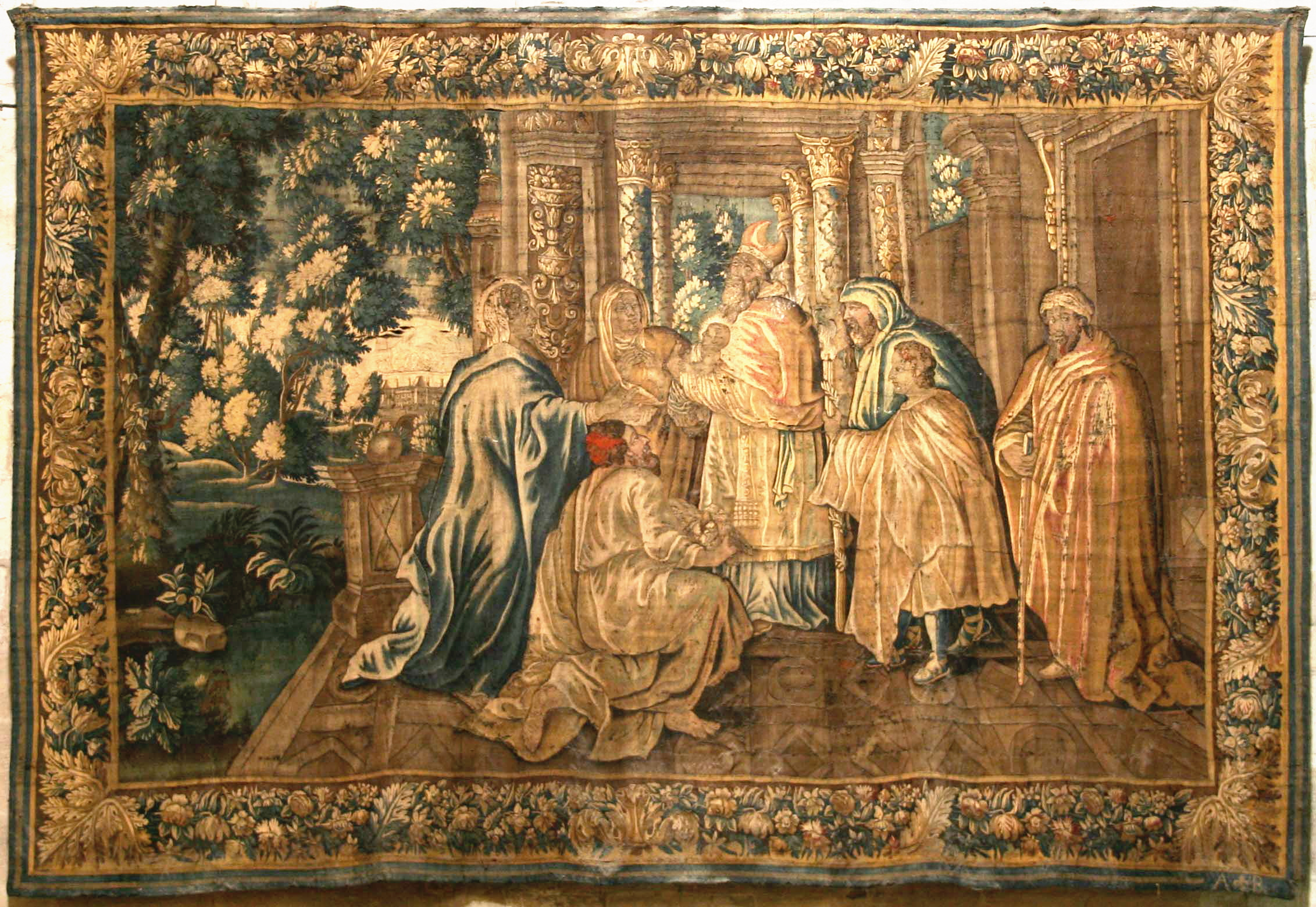 Tapisserie d'Aubusson dans l'église Saint-Trophime à Arles représentant la présentation au temple de l'enfant Jésus